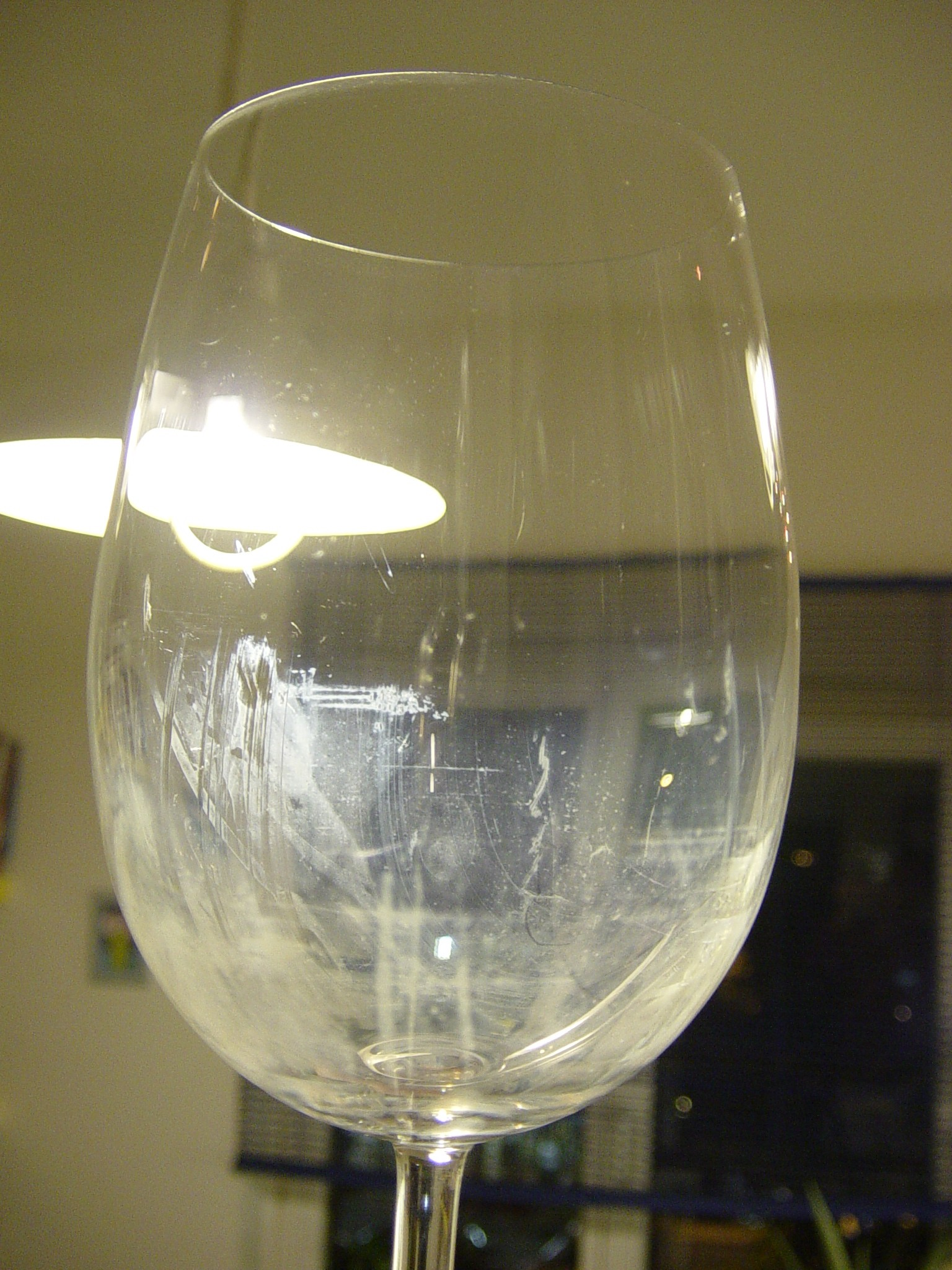 Durch Maschinenspülmittel verursachter Glasbrand – Glaskorrosion in einem Weinglas von LEONARDO, 2 oder 3 Jahre alt, maschinengespült